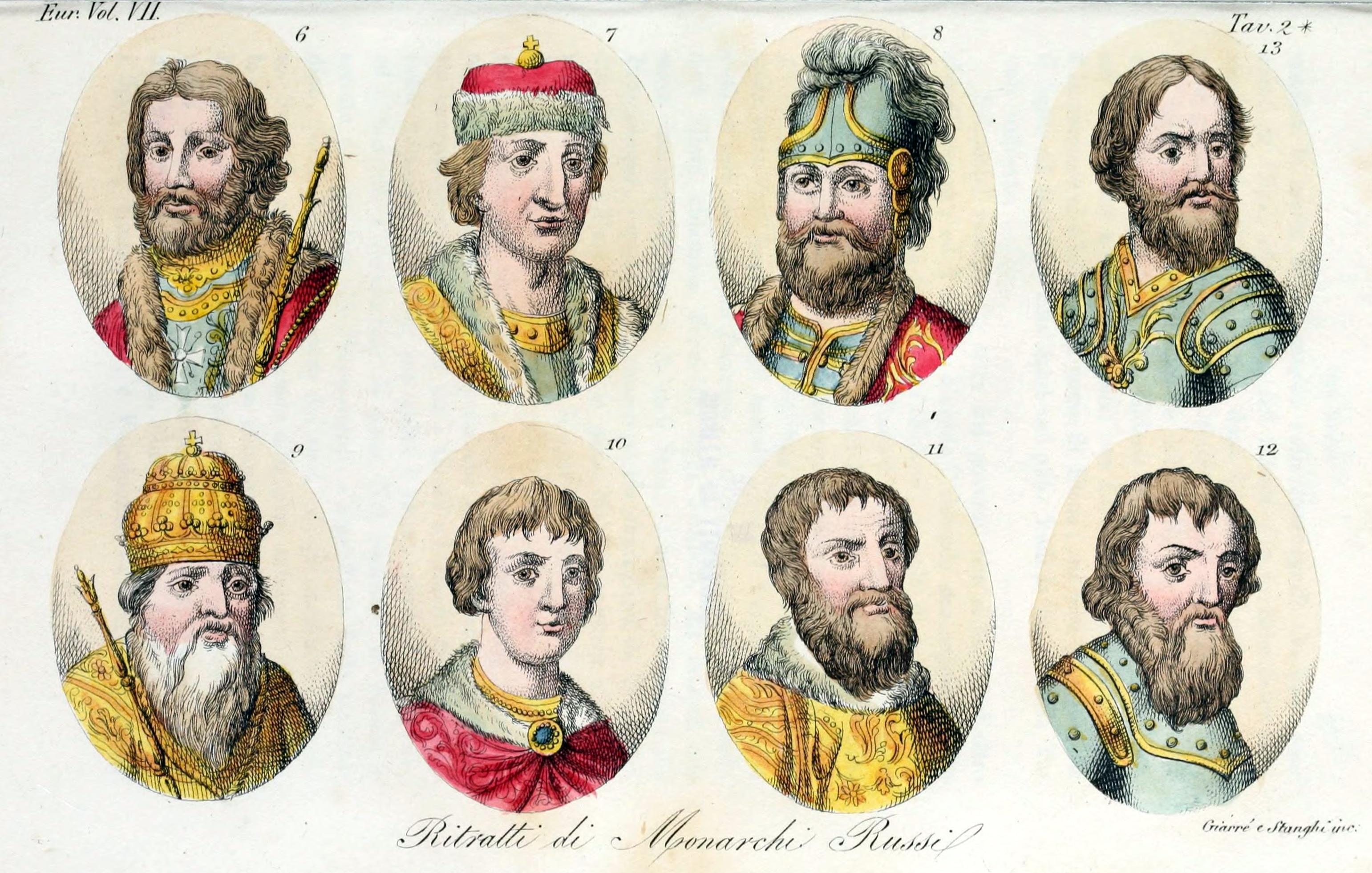 Ritratti di monarchi russi: 6. Jaroslaf 7. Sviatoslaf 8. Sviatopolk 9. Volodomiro Monomaco 10. Giorgio I 11. Ivan II 12. Demetrio IV 13. Ivan III Basilievitz